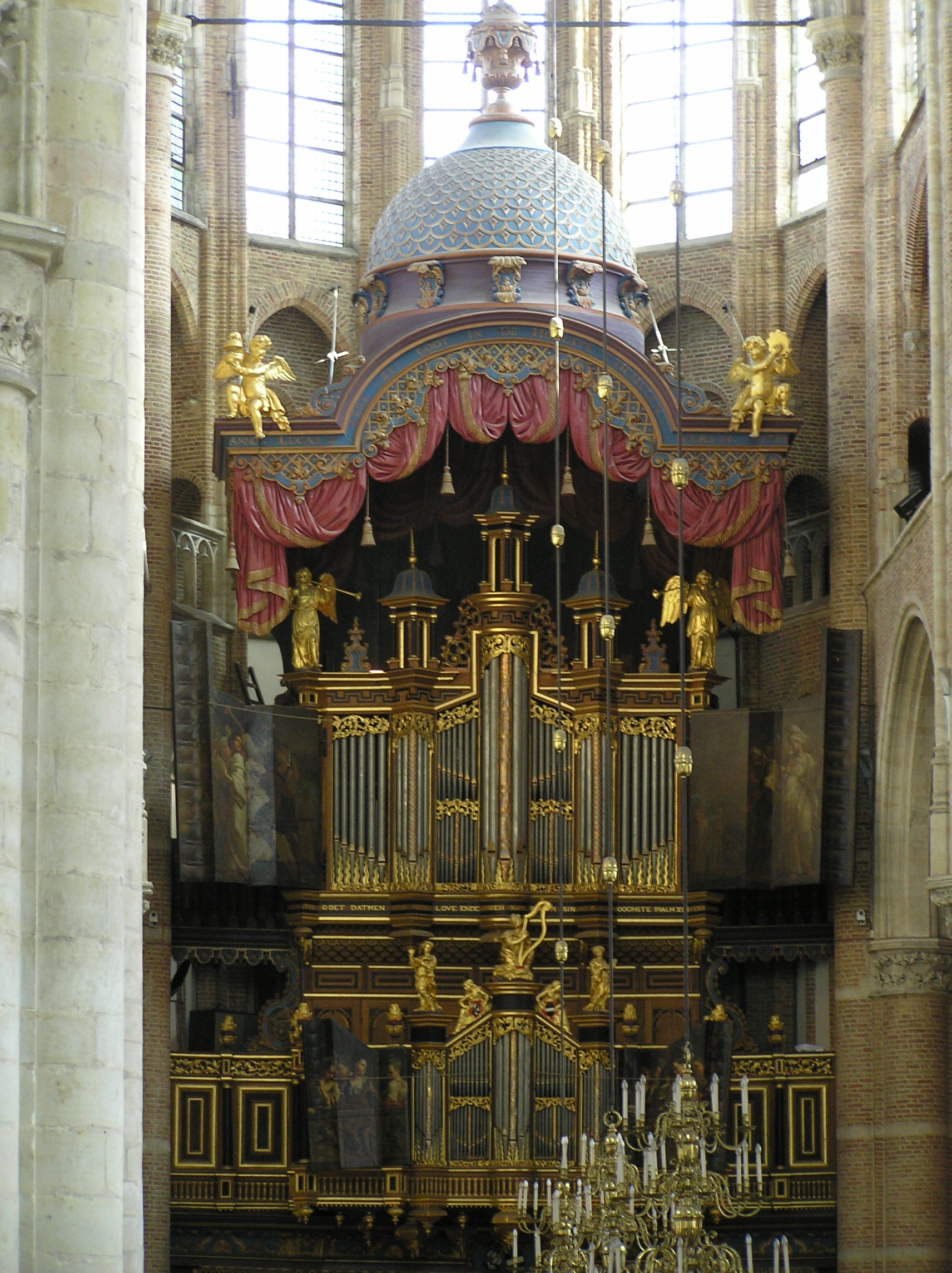 Orgel in de Grote of Maria Magdalenakerk in Goes. Stamt uit 1969-1971 met veel oude elementen: 9 oude registers, fontpijpen uit 1711, orgelkas met galerij (1641-'43 door Willem Diaken) behangen met luiken, beschilderd door de Dordtse schilder Bisschop.